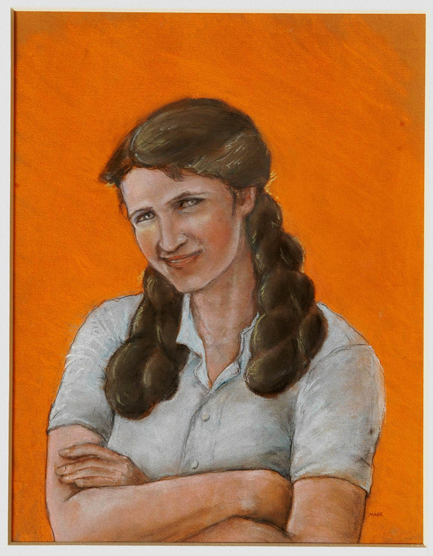 ELLA